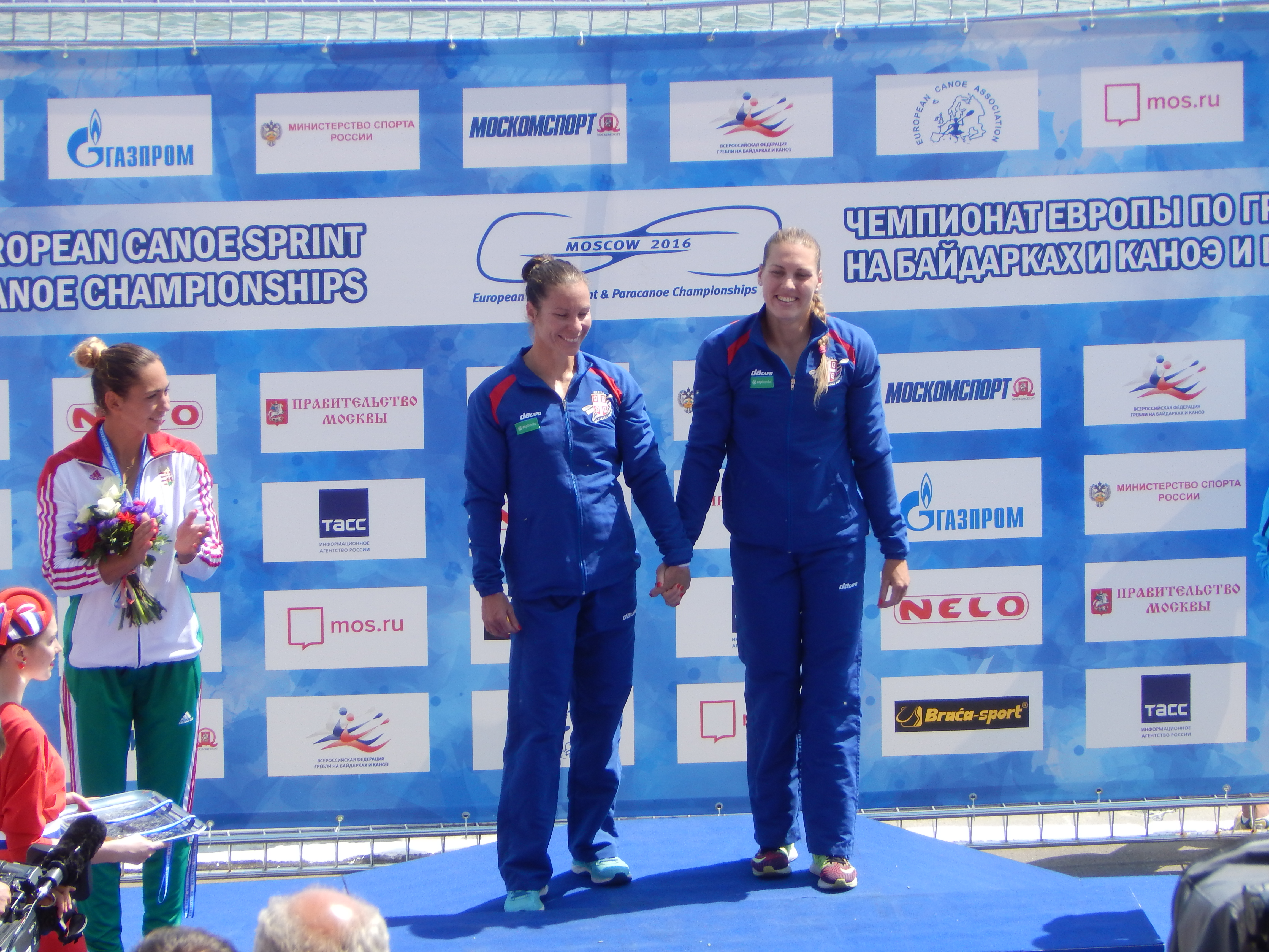 Сербская двойка выигрывает золото чемпионата Европы 2016